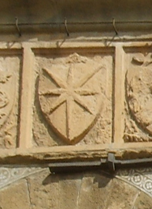 Stemma_arte_giudici_e_notai,_firenze